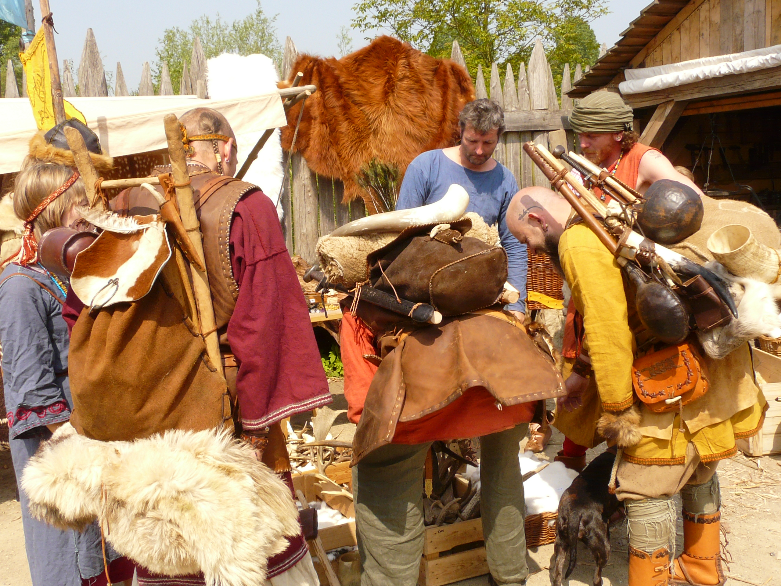 alljährlicher Wikingermarkt im Historisch Openluchtmuseum Eindhoven